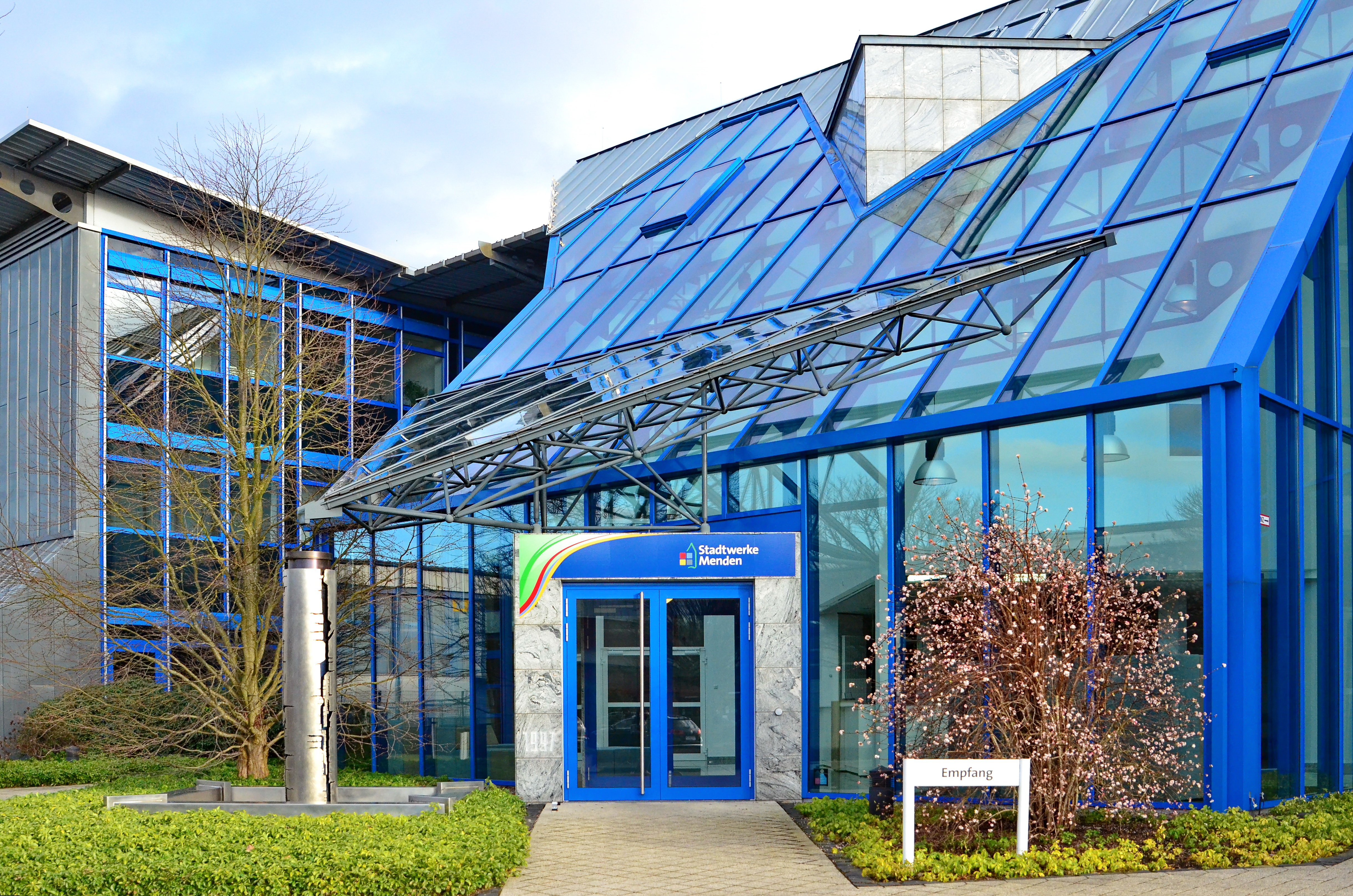 Sitz der Stadtwerke Menden GmbH im Sauerland.